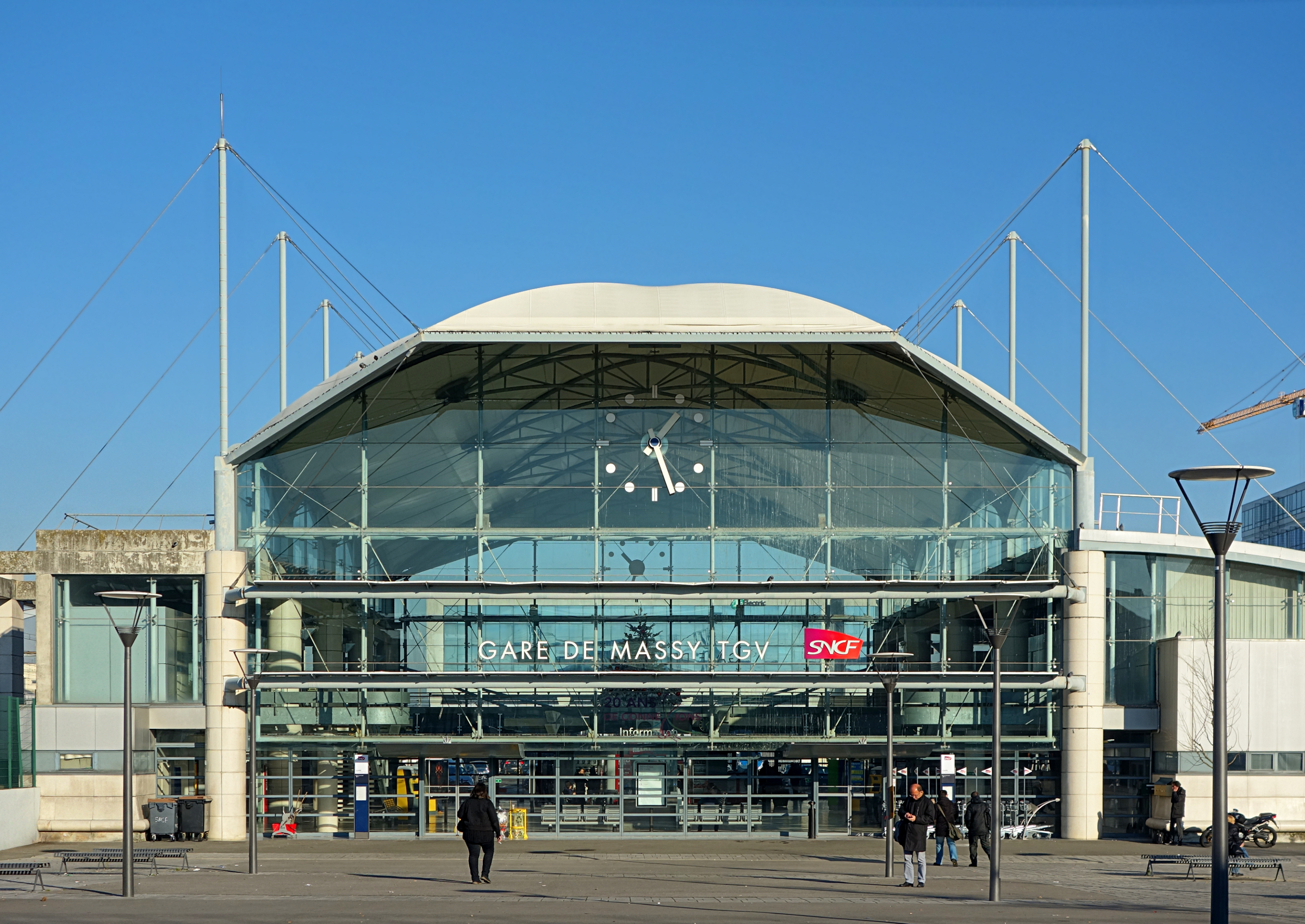 La gare de Massy TGV (façade sud).